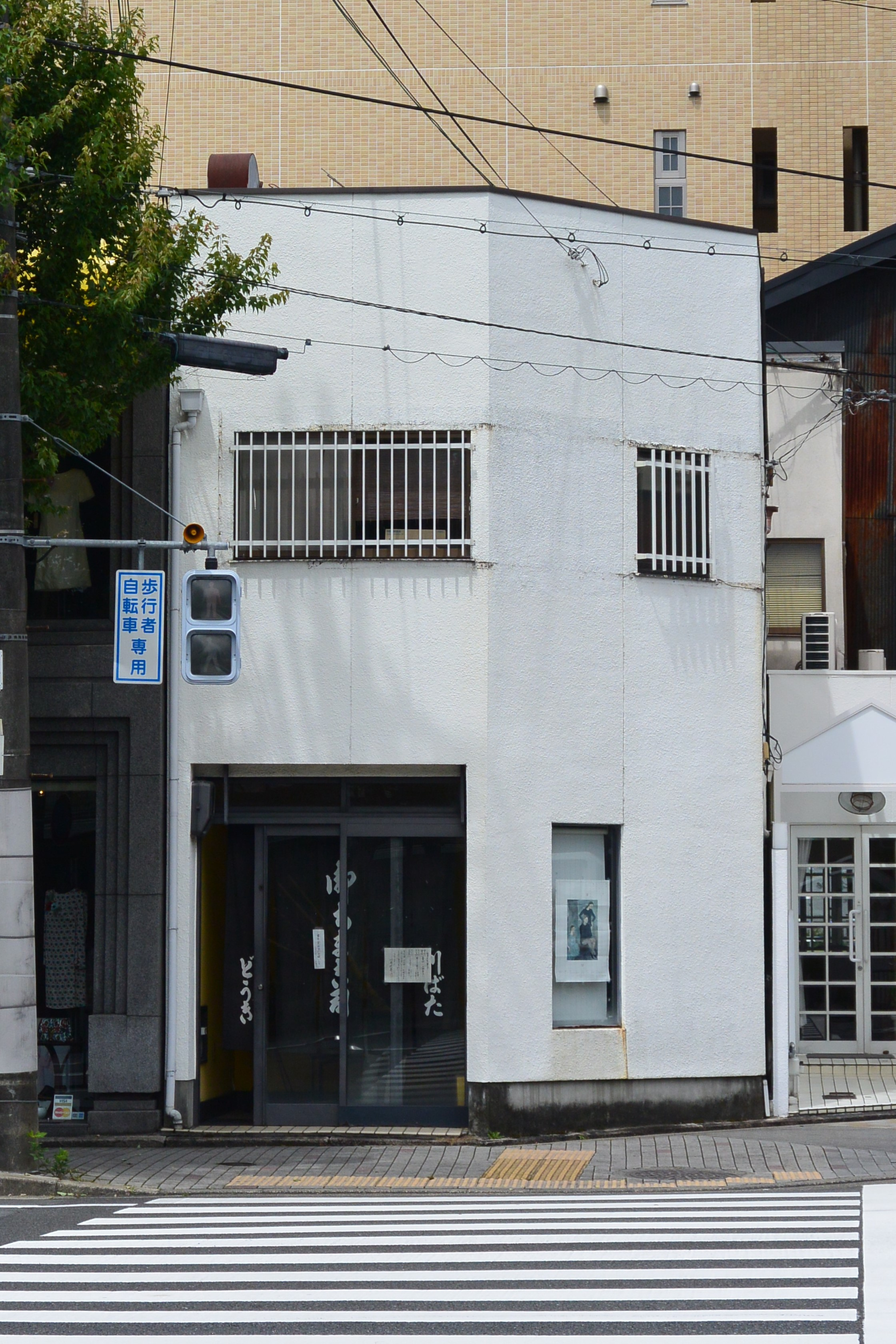 京都の老舗の粽屋の川端道喜の店、予約注文された製品のみを販売するので店舗は質素。川端道喜 Nikon 1 AW1 + 1 Nikkor AW 11-27.5mm f/3.5-5.6